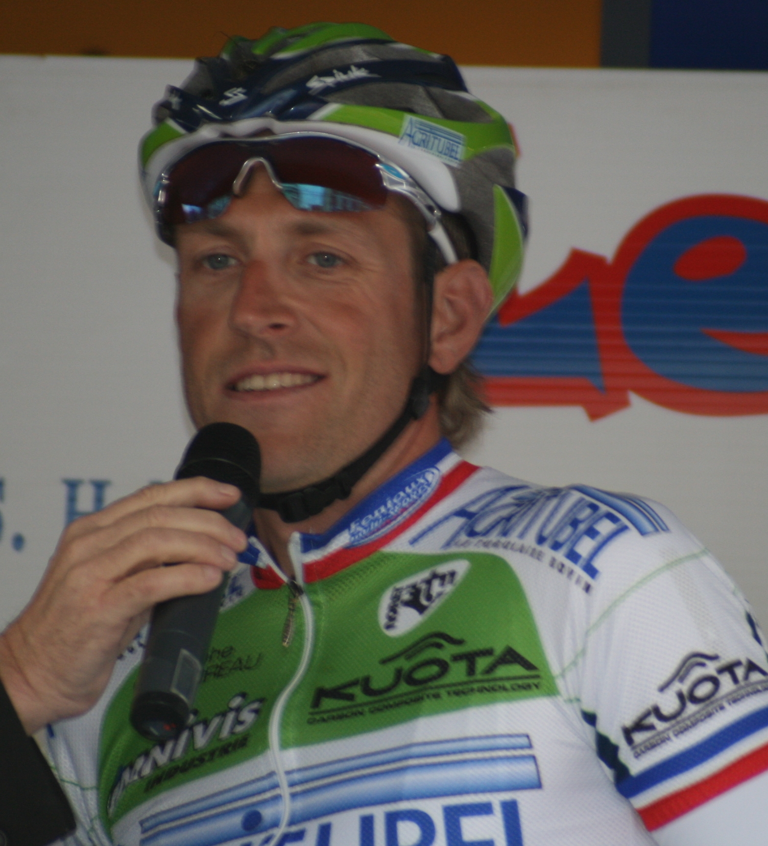 Christophe Moreau au Guidon d'or hellemmois 2008